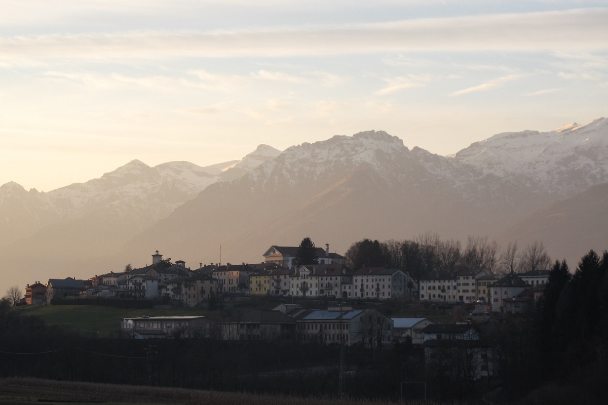 Panorama del centro storico di Mel (BL), Italia.